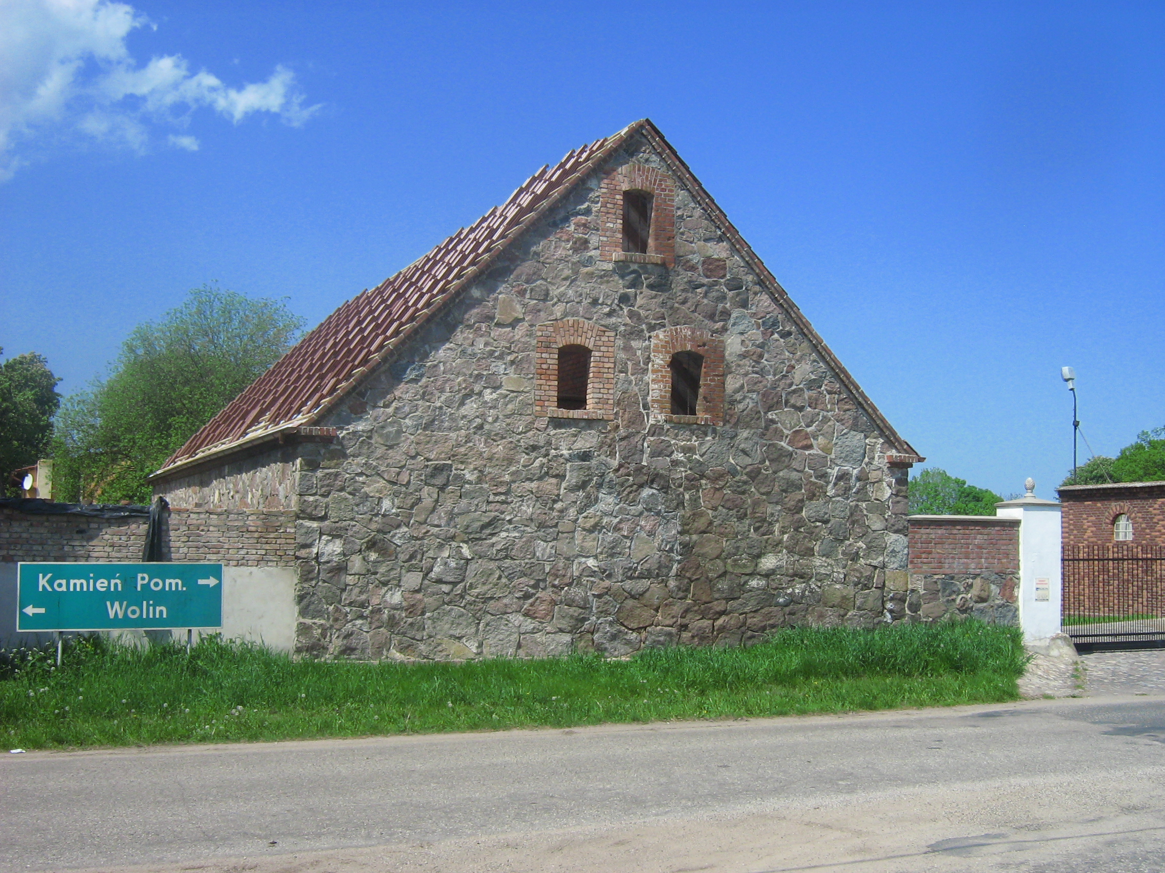 Zabytkowy dom w Sibinie